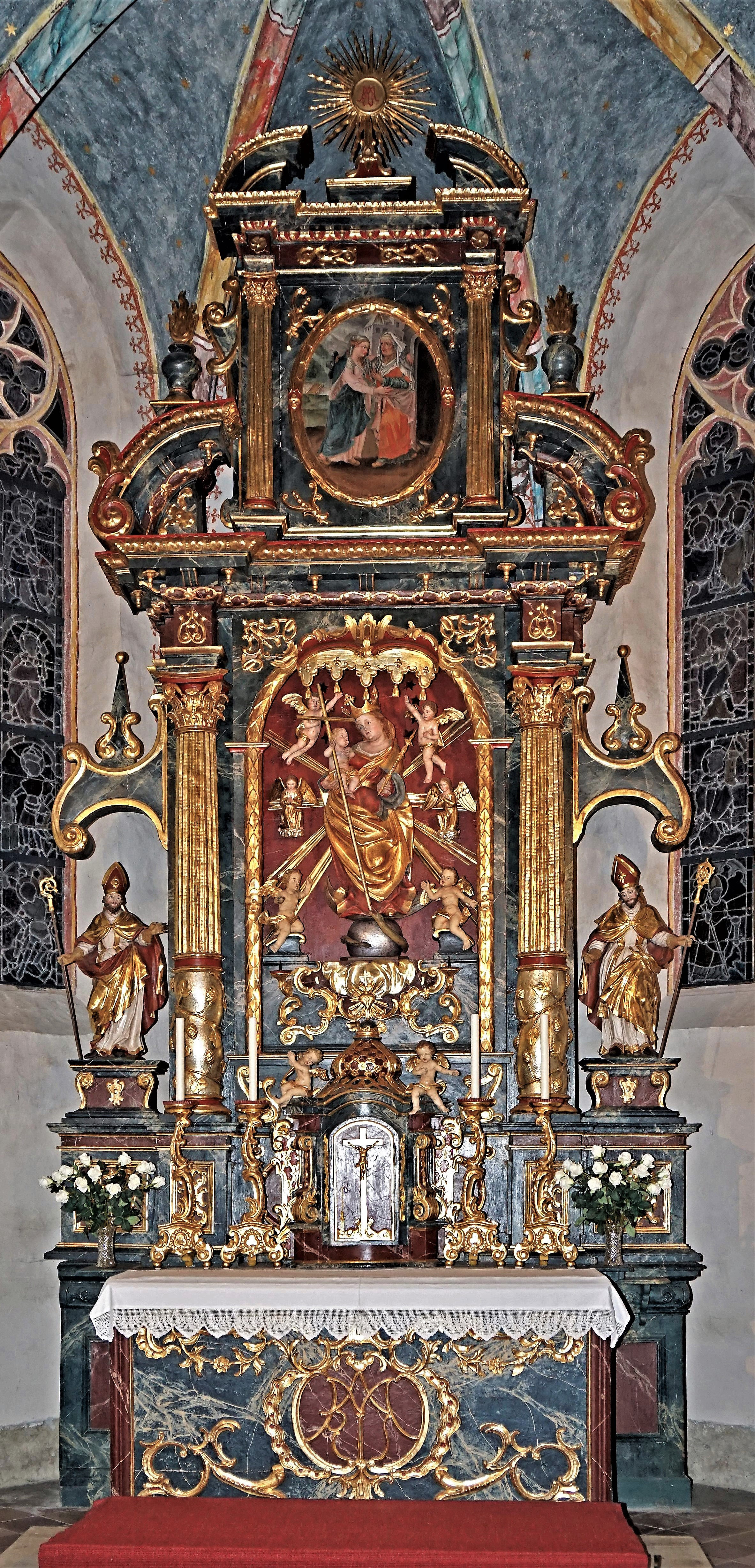 Kath. Filialkirche, Wallfahrtskirche Maria Höfl, Metnitz, barocker Hochaltar, Marienaltar